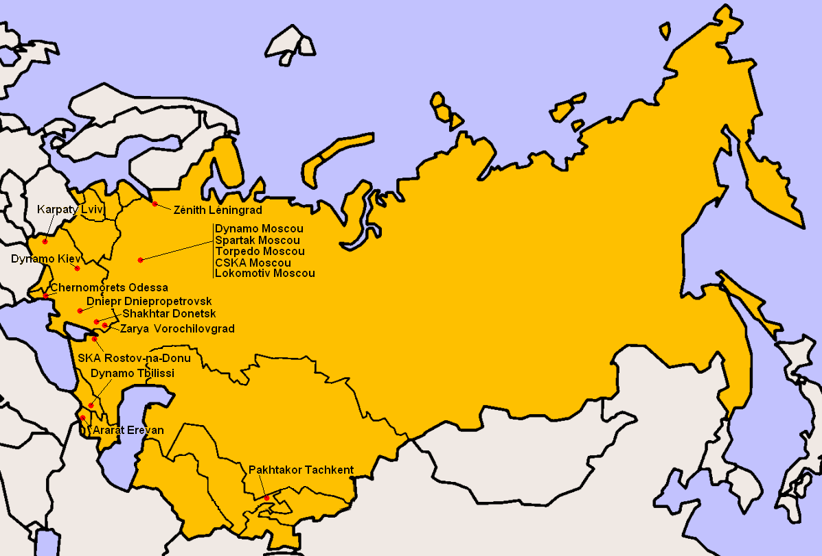 Clubs participants à la Division Supérieure 1975.